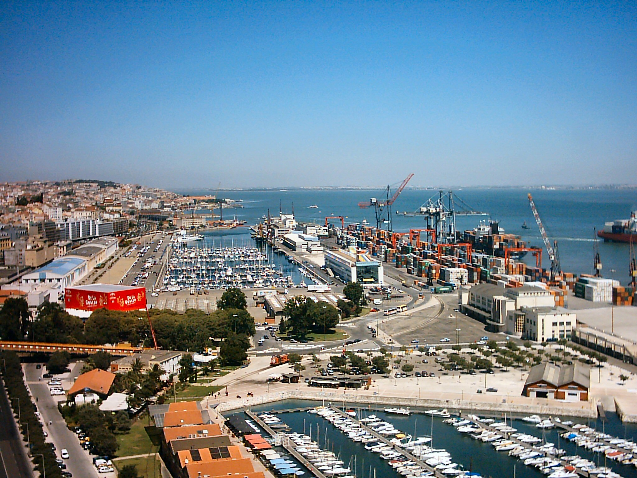 Vista do Porto de Lisboa, Lisboa, Portugal